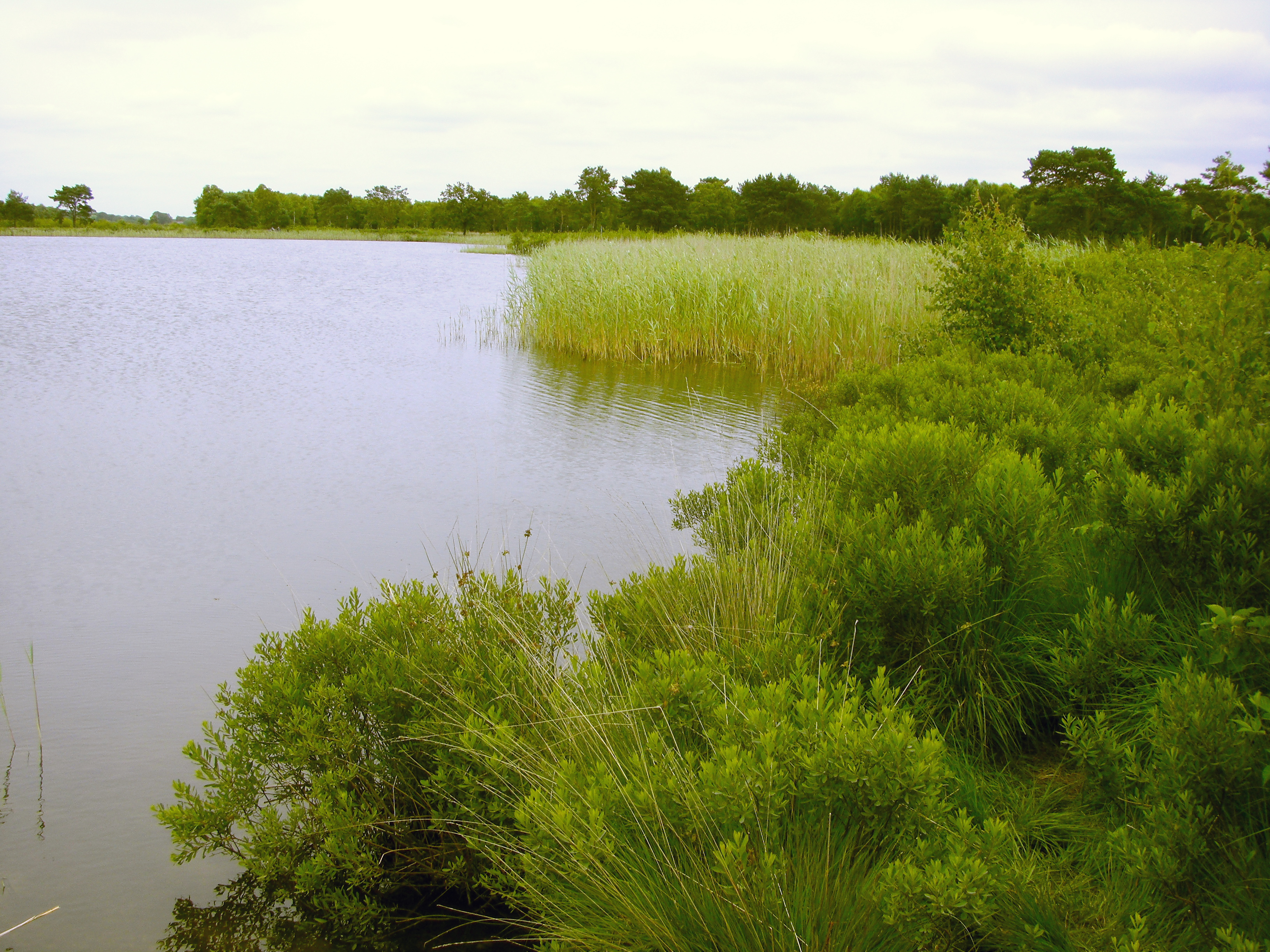 NSG Wollingster See und Randmoore